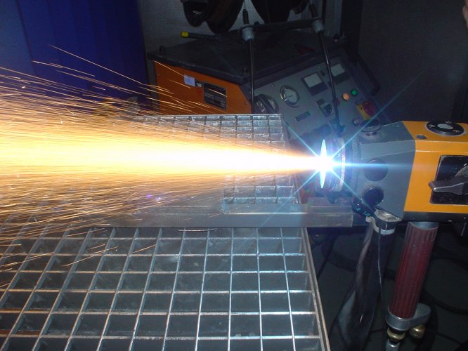 Lichtbogendrahtspritzanlage zur Verarbeitung von Massiv- und Fülldrähten